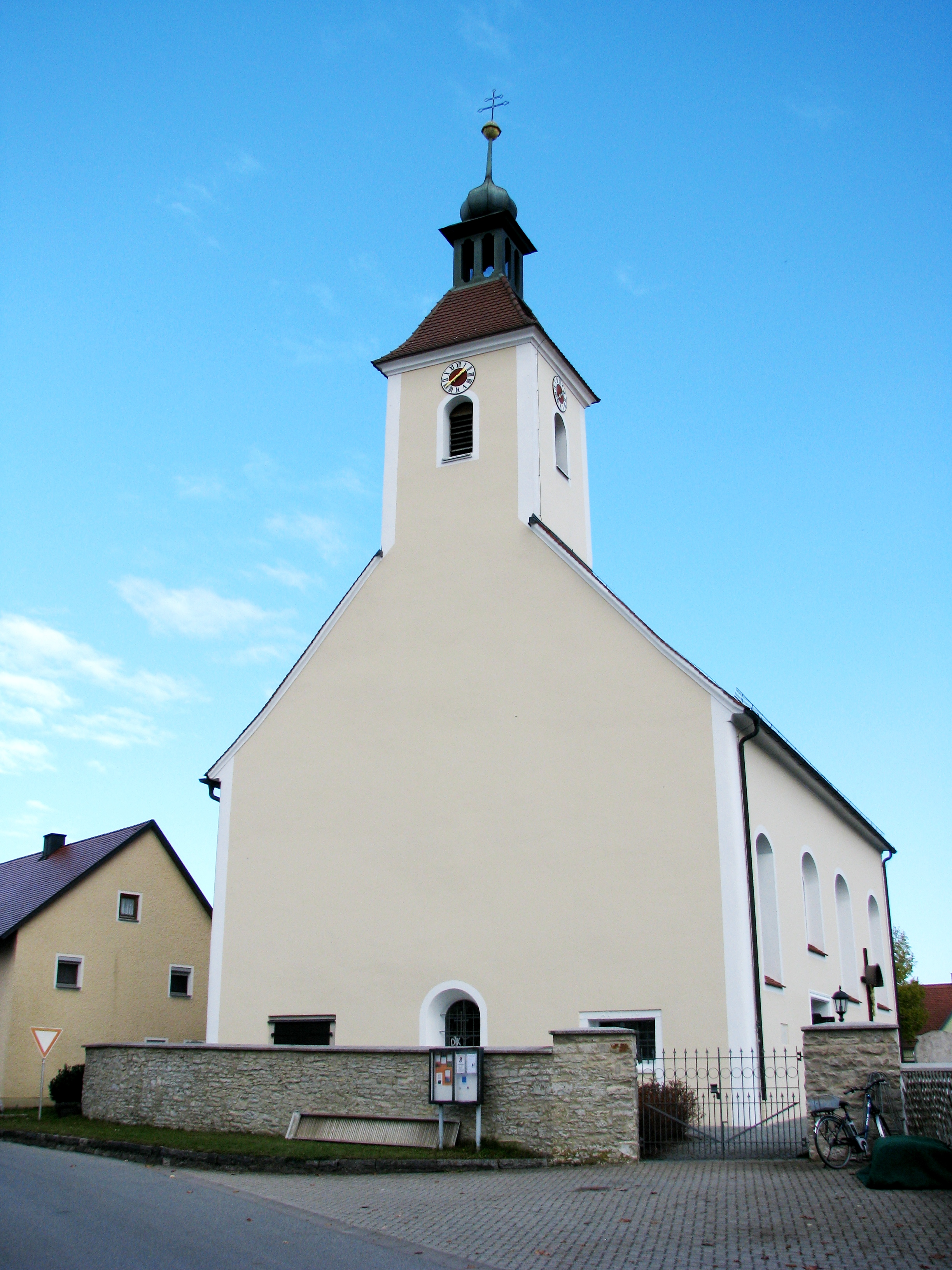 Burggriesbach, Ortsteil von Freystadt im Landkreis Neumarkt in der Oberpfalz in Bayern, Pfarrkirche St. Gangolf